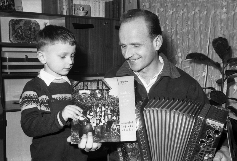 Lojze Slak s sinom Slavkom.